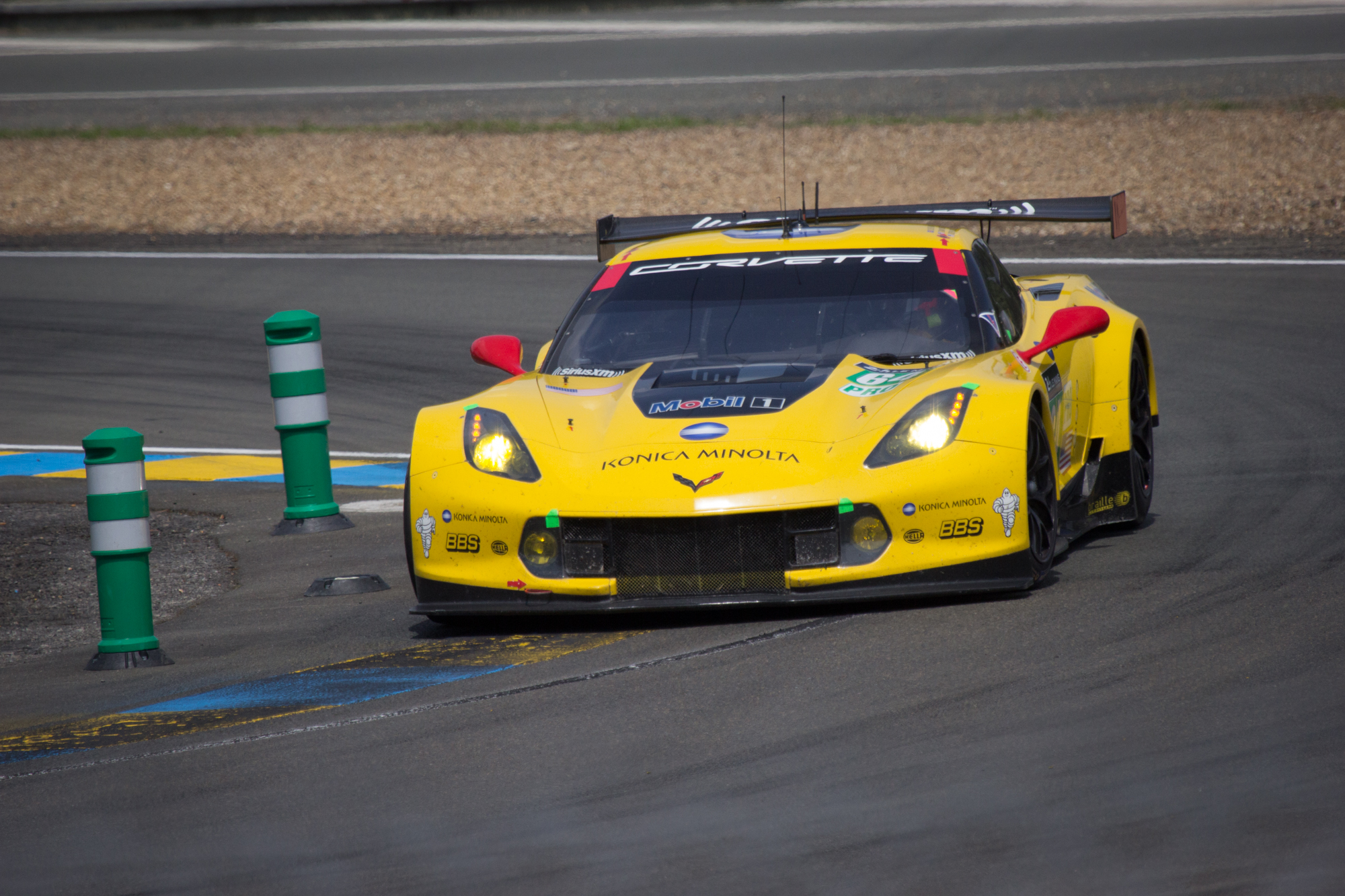 Corvette Racing GM - Chevrolet Corvette C7R #64